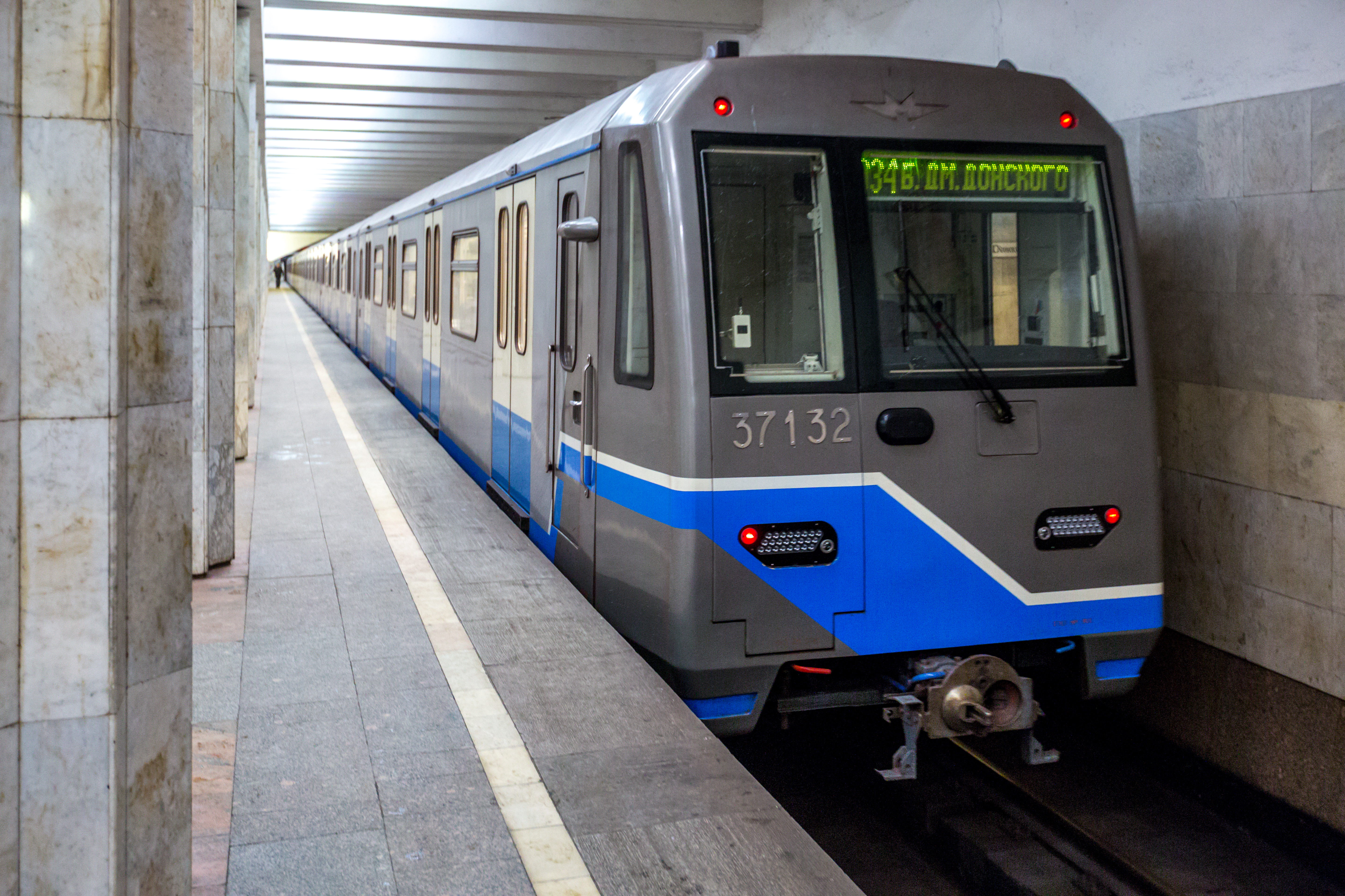 Электропоезд метрополитена 81-760-761 с головным вагоном № 37132. Станция Севастопольская, Московский метрополитен